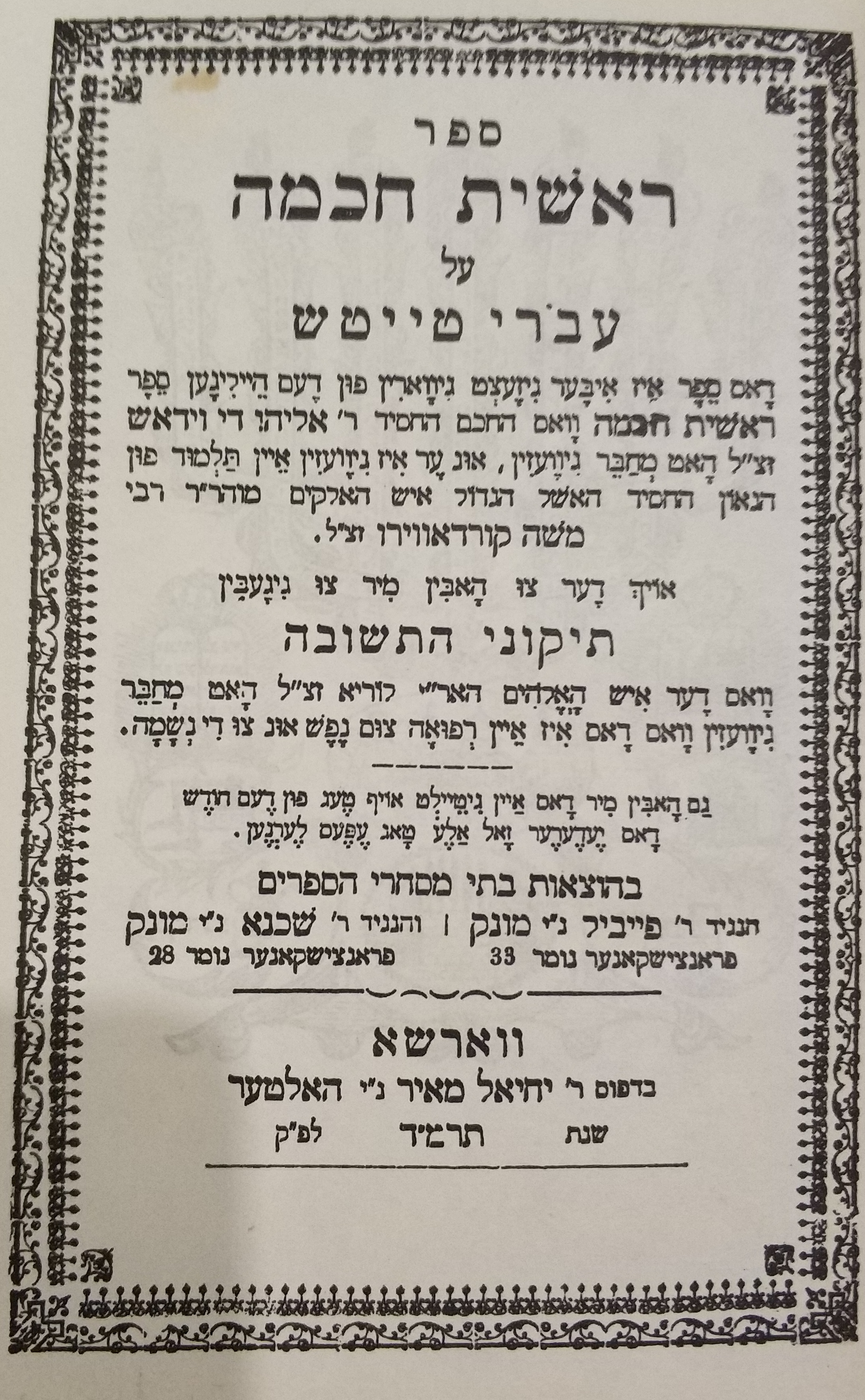 ראשית חוכמה שער הדפסה משנת תרמ"ד 1884 ווארשא, ביידיש